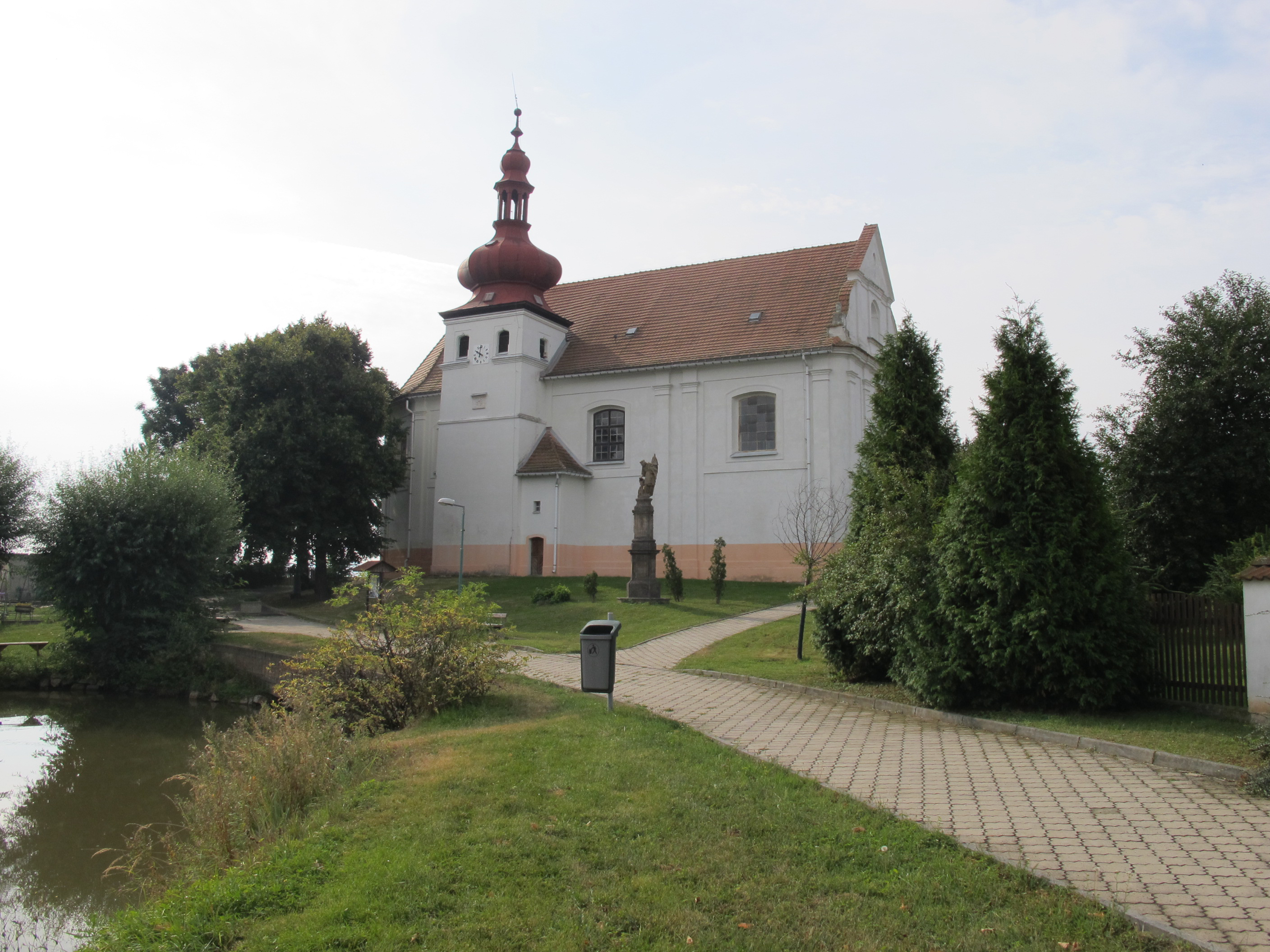 Kostel sv. Jana Evangelisty (Malé Březno), návrší v SV části obce, Malé Březno